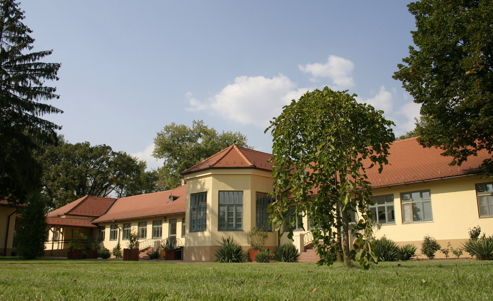 Wenckheim-Almássy-kastély (Gyula, Széchenyi u. 69., 71-76.) This is a photo of a monument in Hungary, Identifier: 16240